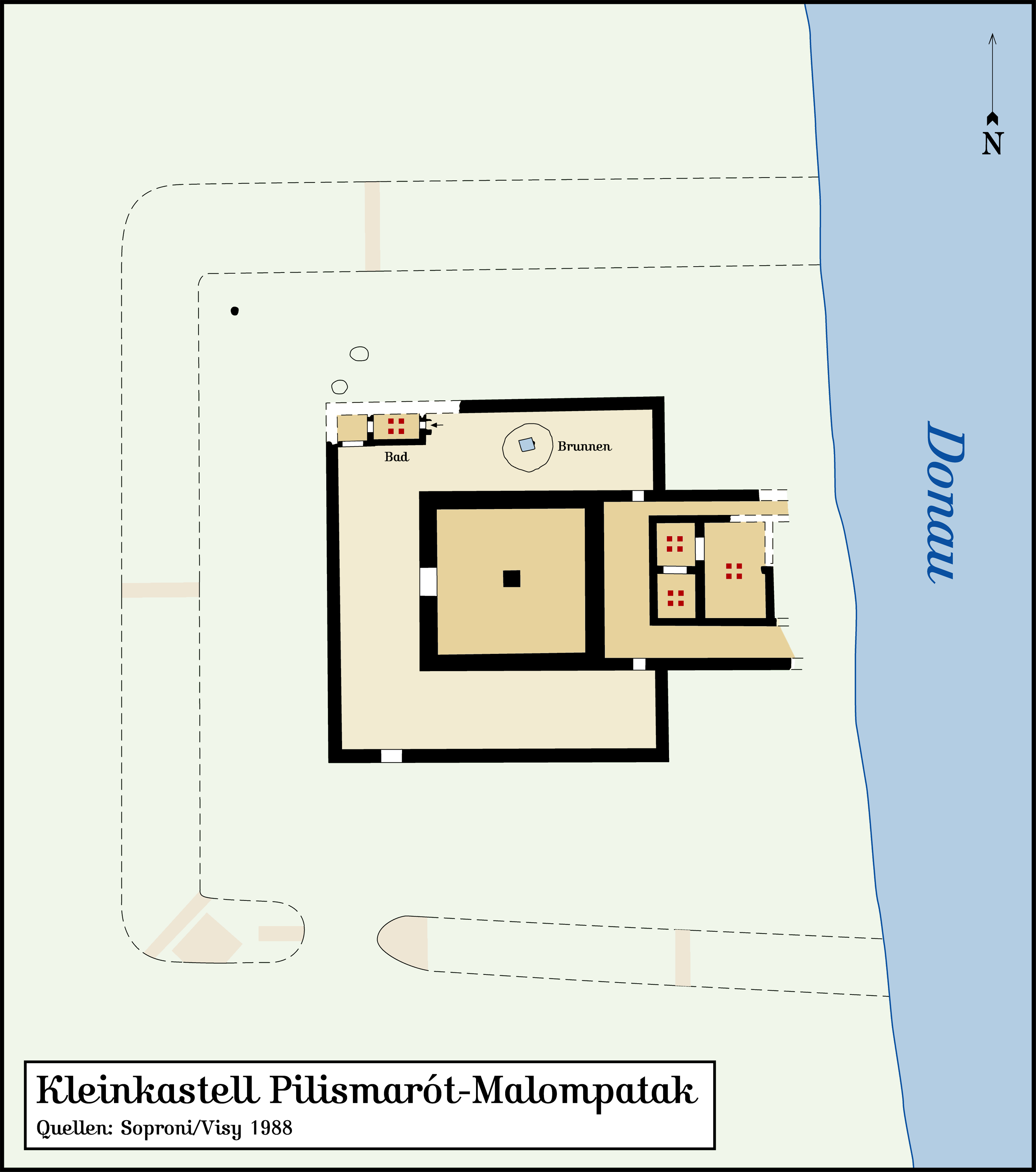 Das spätantike Kleinkastell Pilismarot-Malompatak am ungarischen Donaulauf nach den Forschungen von S. Soproni. Quelle: Visy (Theiss 1988). Gezeichnet in FreeHand MX für Macintosh; abgespeichert in Adobe Photoshop CS.